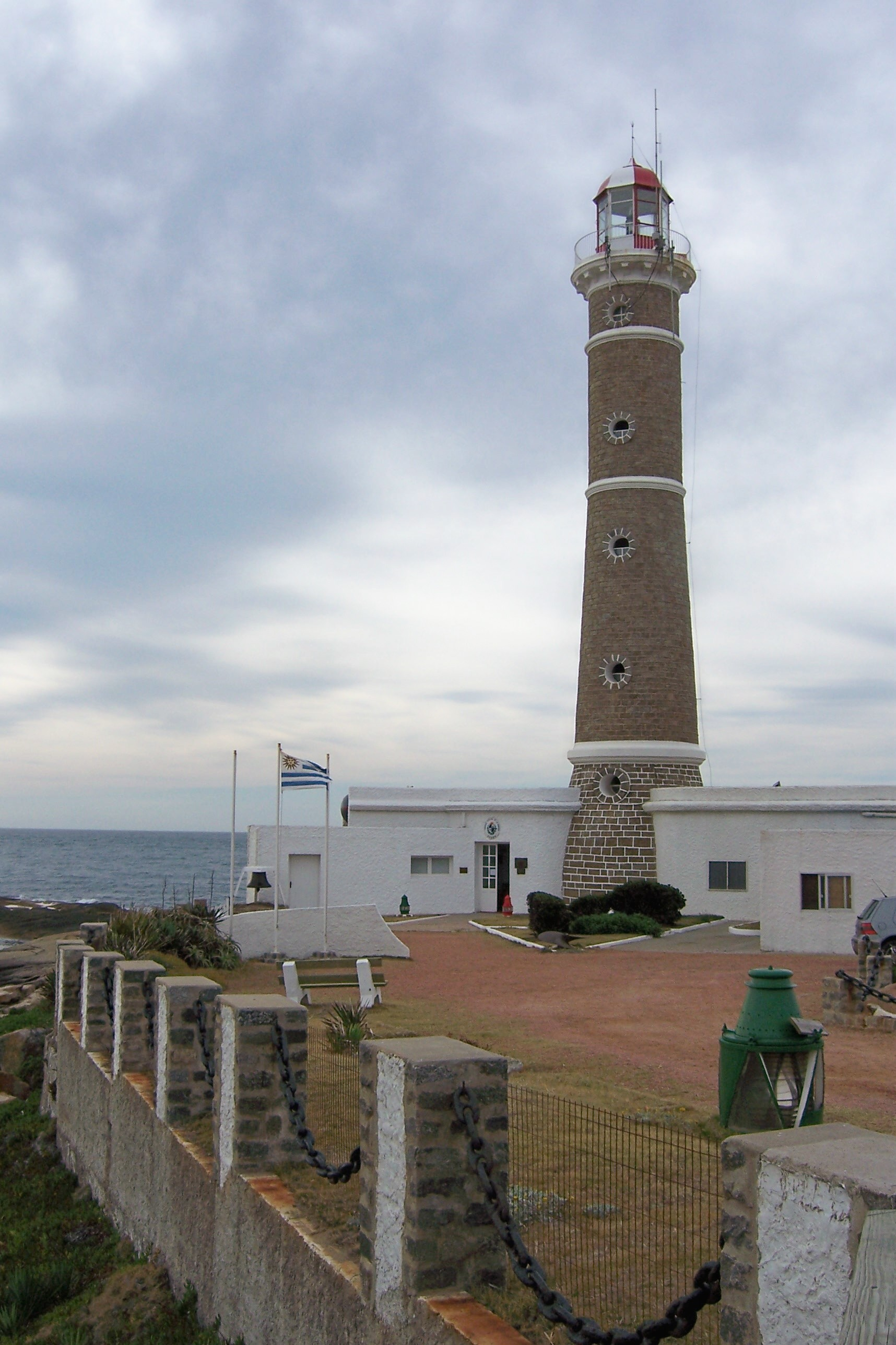 Faro de José Ignacio, Uruguay.